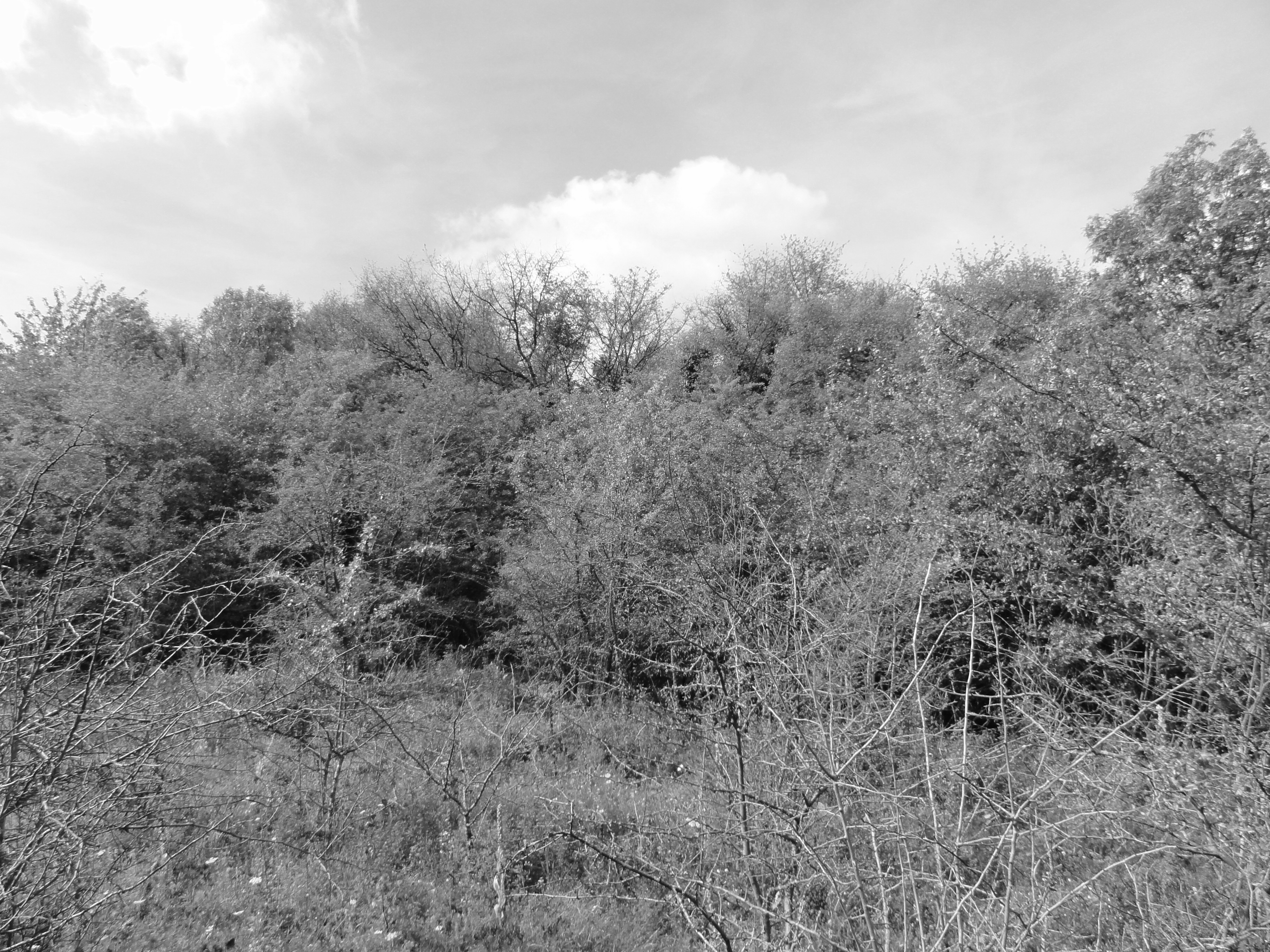 Terril n° 65A dit 10 de Béthune Ouest, Fosse n° 10 - 10 bis de la Compagnie des mines de Béthune, Sains-en-Gohelle, Pas-de-Calais, Nord-Pas-de-Calais, France.